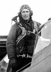 Борис Феоктистович Сафонов (1915 — 1942) — советский военный лётчик, подполковник, дважды Герой Советского Союза